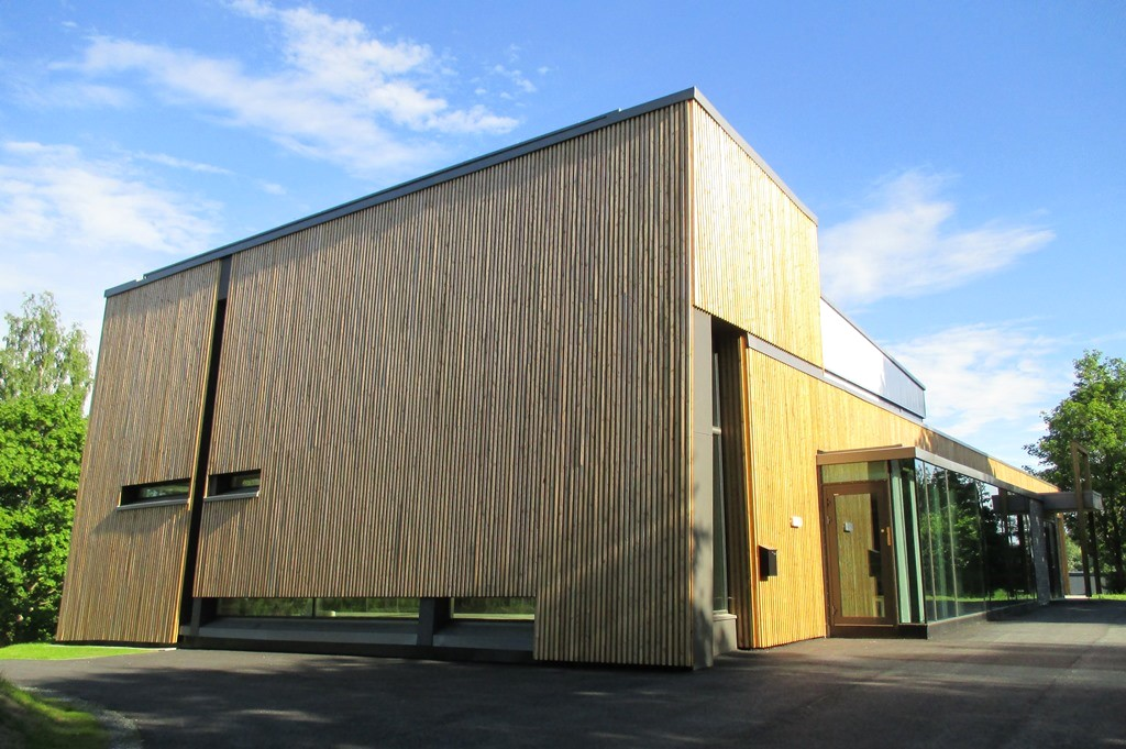 Grinilund kirke. Nytt kirkebygg 2014. Arkitekt: Terje Grønmo.